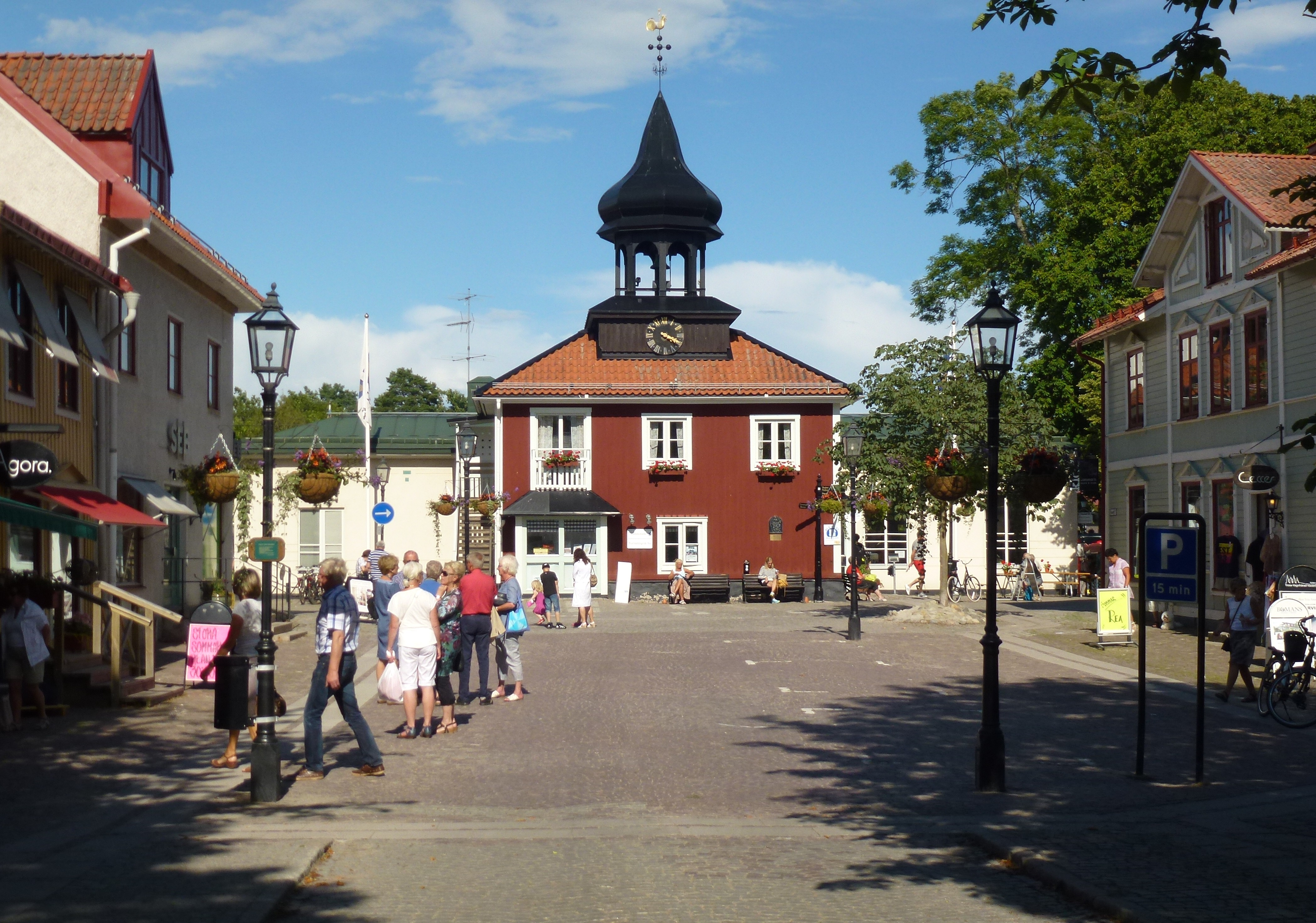 Trosa bibliotek